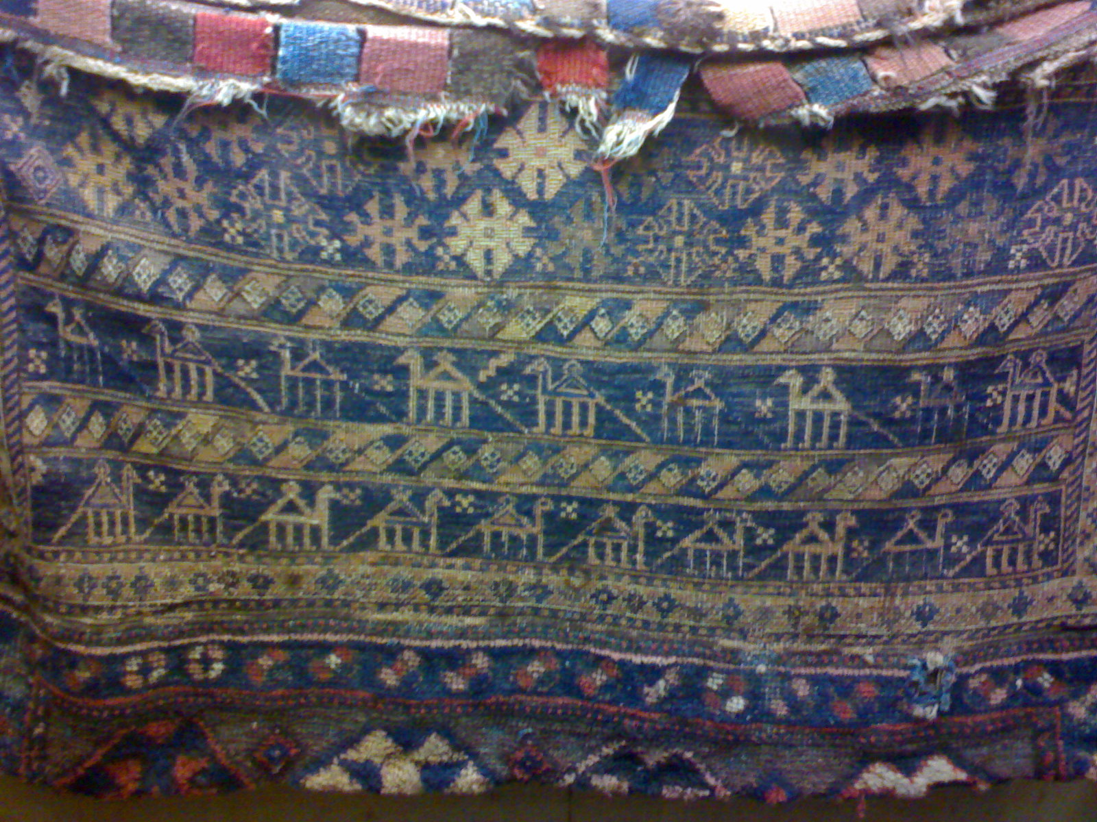 یک گلیم بافته شده در خرم‌آباد، موزه مردم شناسی فلک‌الافلاک